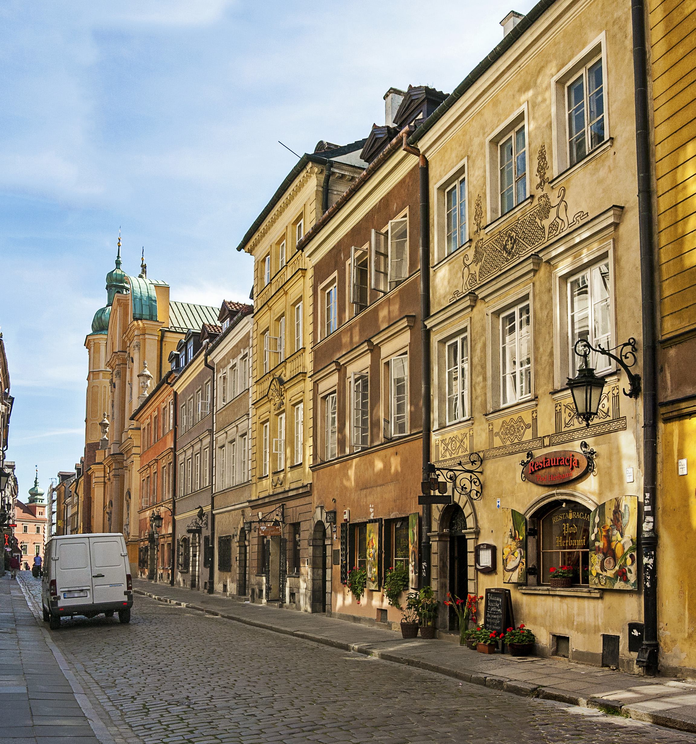 Założenie urbanistyczne ul. Piwna, Warszawa, dz. Śródmieście 07.1965.